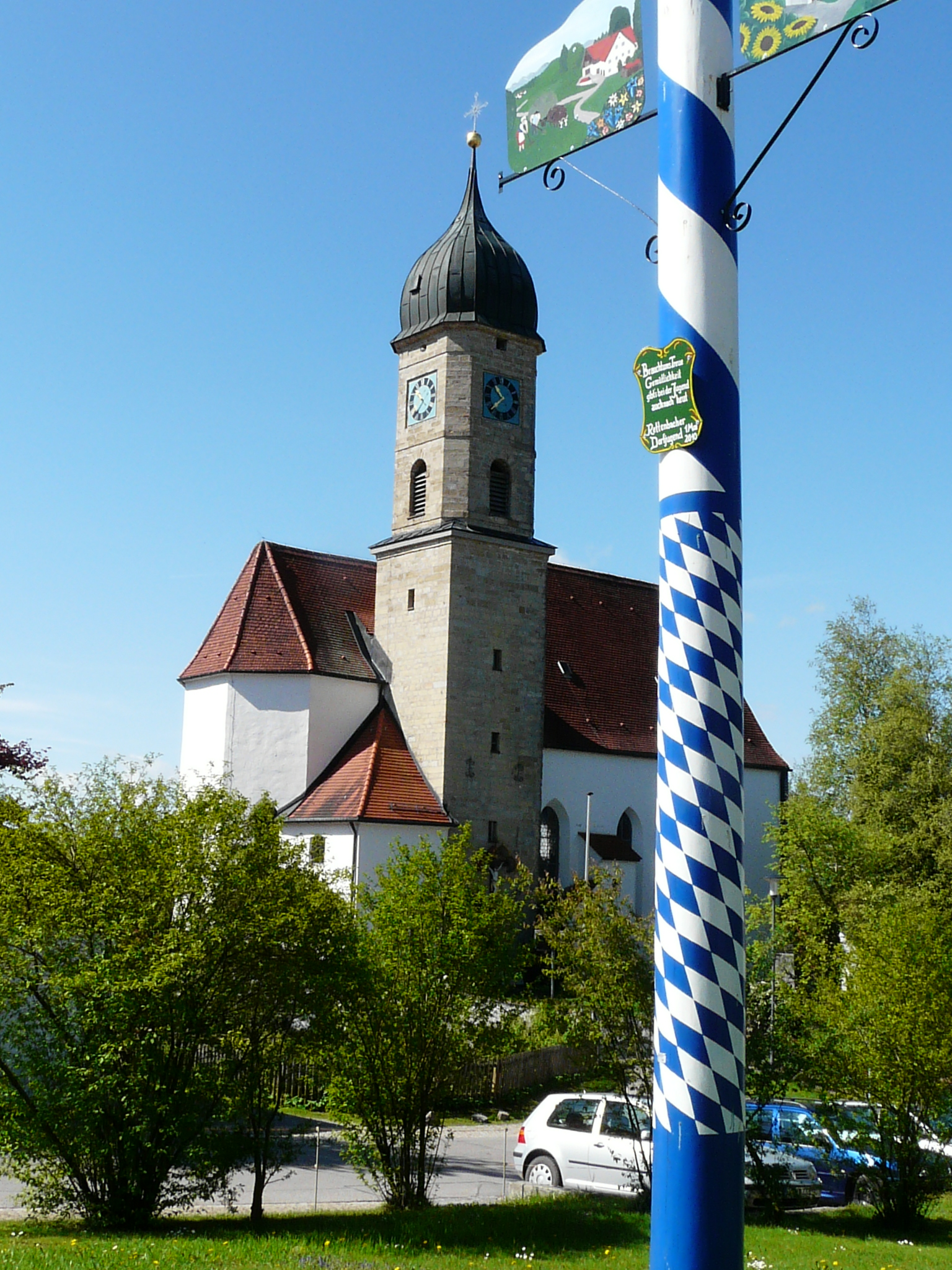 Pfarrkirche in Rettenbach am Auerberg